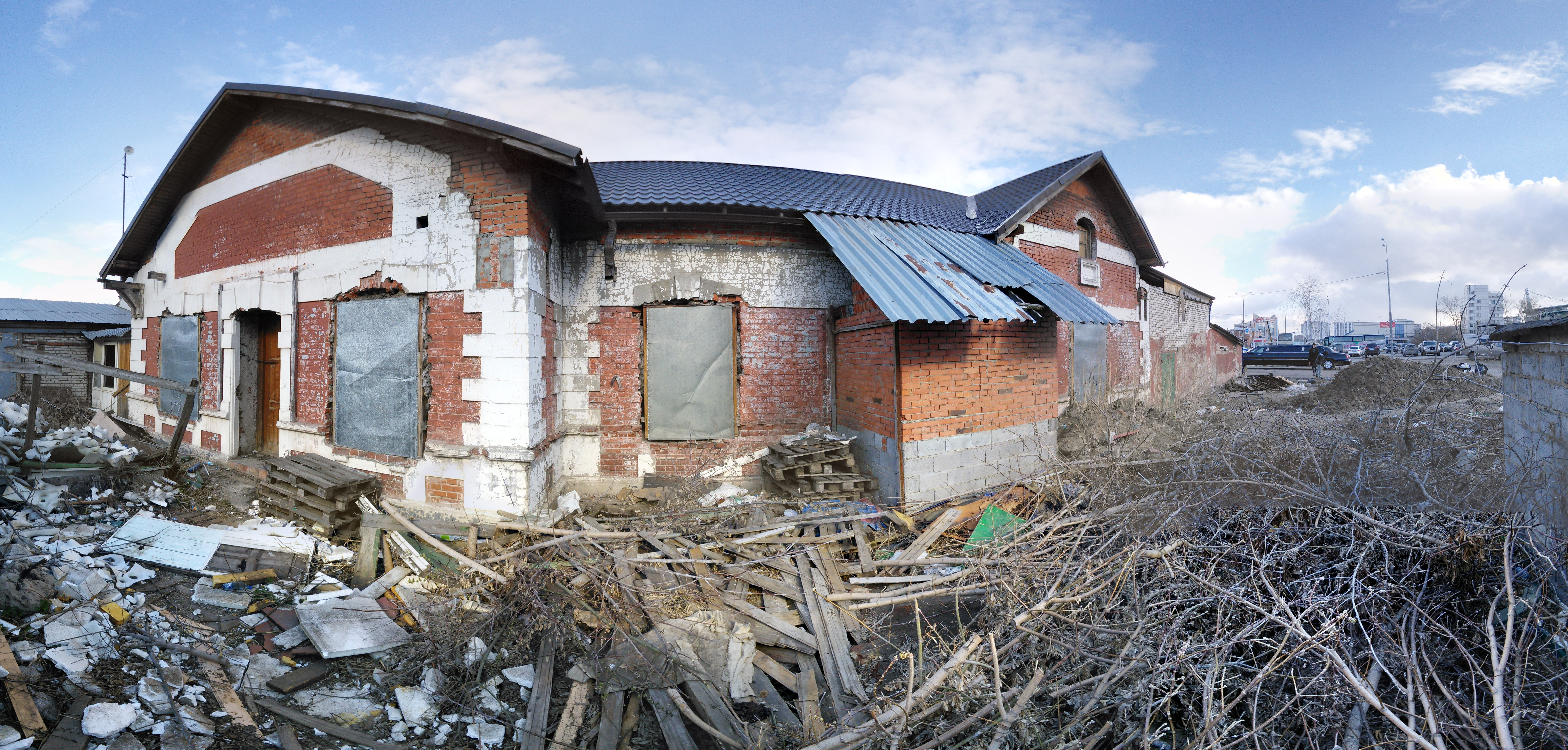 Комплекс зданий и сооружений станции Черкизово - Казарма: нет адреса БТИ, Преображенское, Восточный округ, Москва